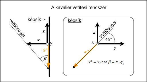 A klinogonális vetítőrendszer leírása